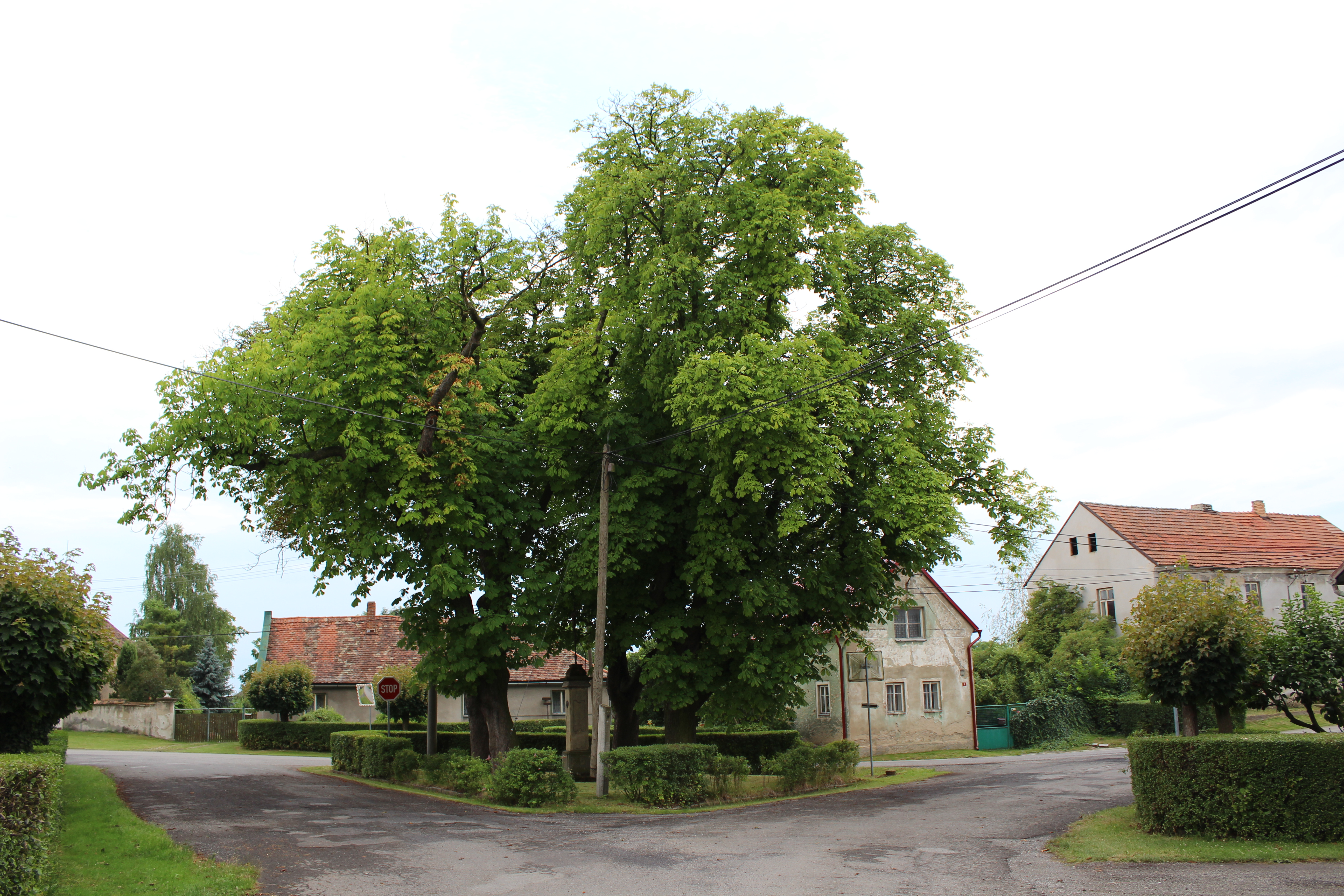 Vzrostlý strom na návsi v Hrušově v mladoboleslavském okrese.